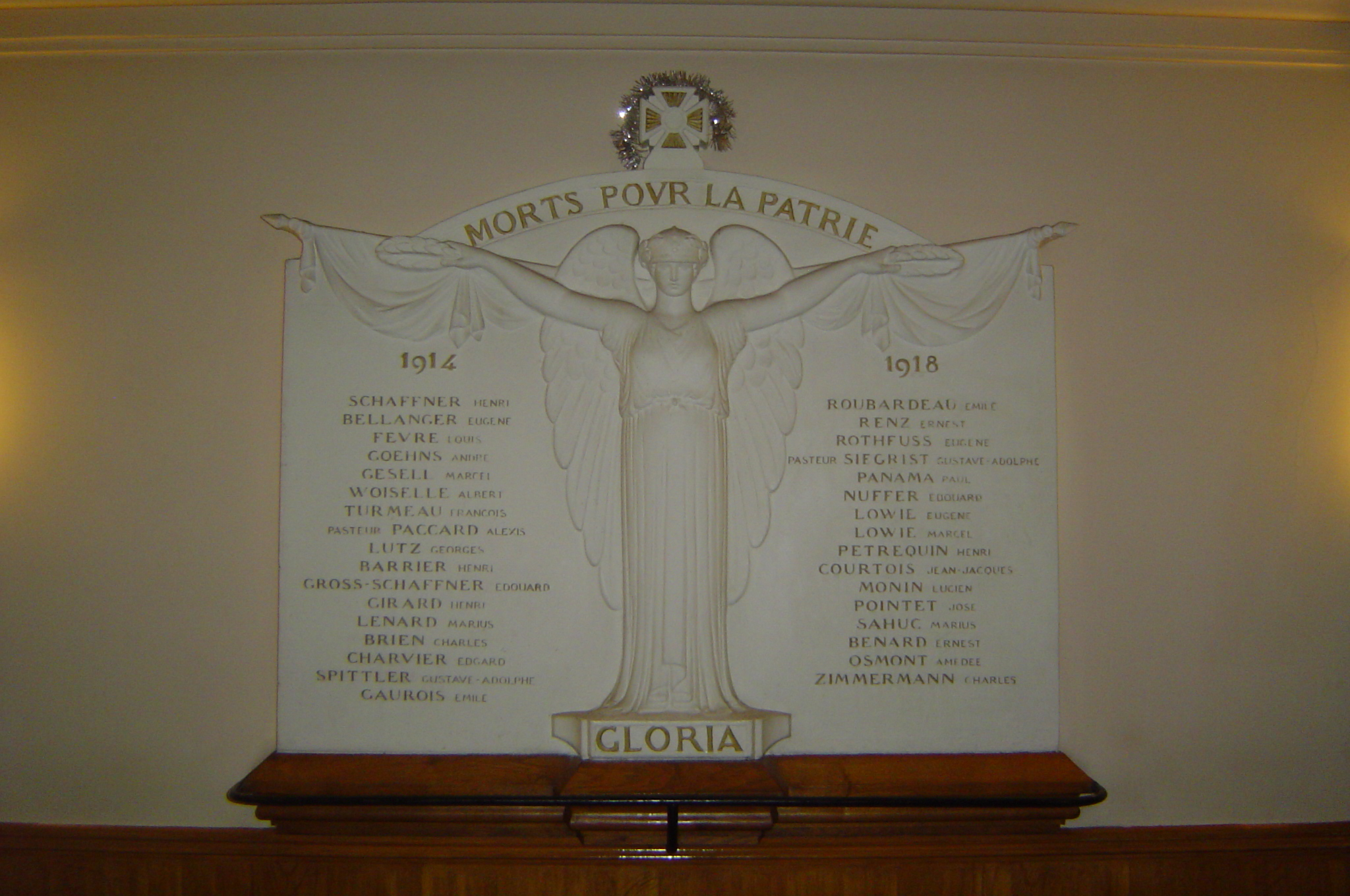 Paul Silvestre, Monument aux morts de l'église luthérienne de l'Ascencion (Paris, 17e), 1919.